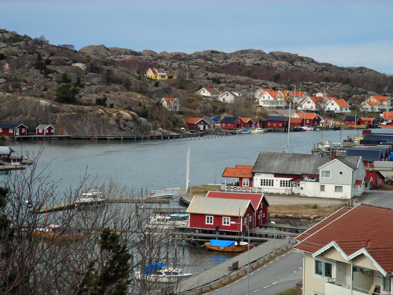 Hamburgsund, Sundet norrut, Tanums kommun, Bohuslän, Sweden